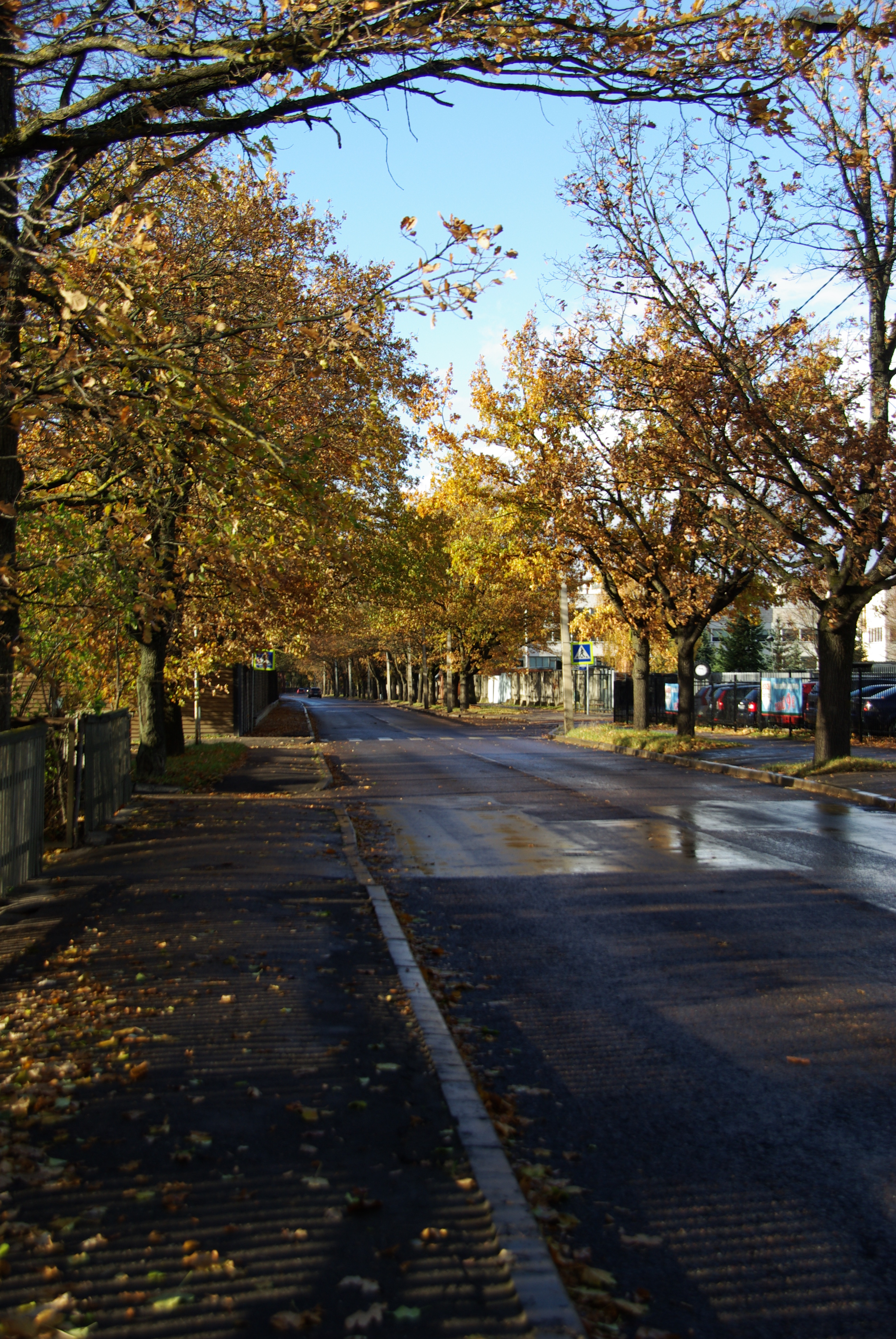 Tartu